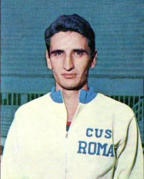 L'atleta Roberto Frinolli